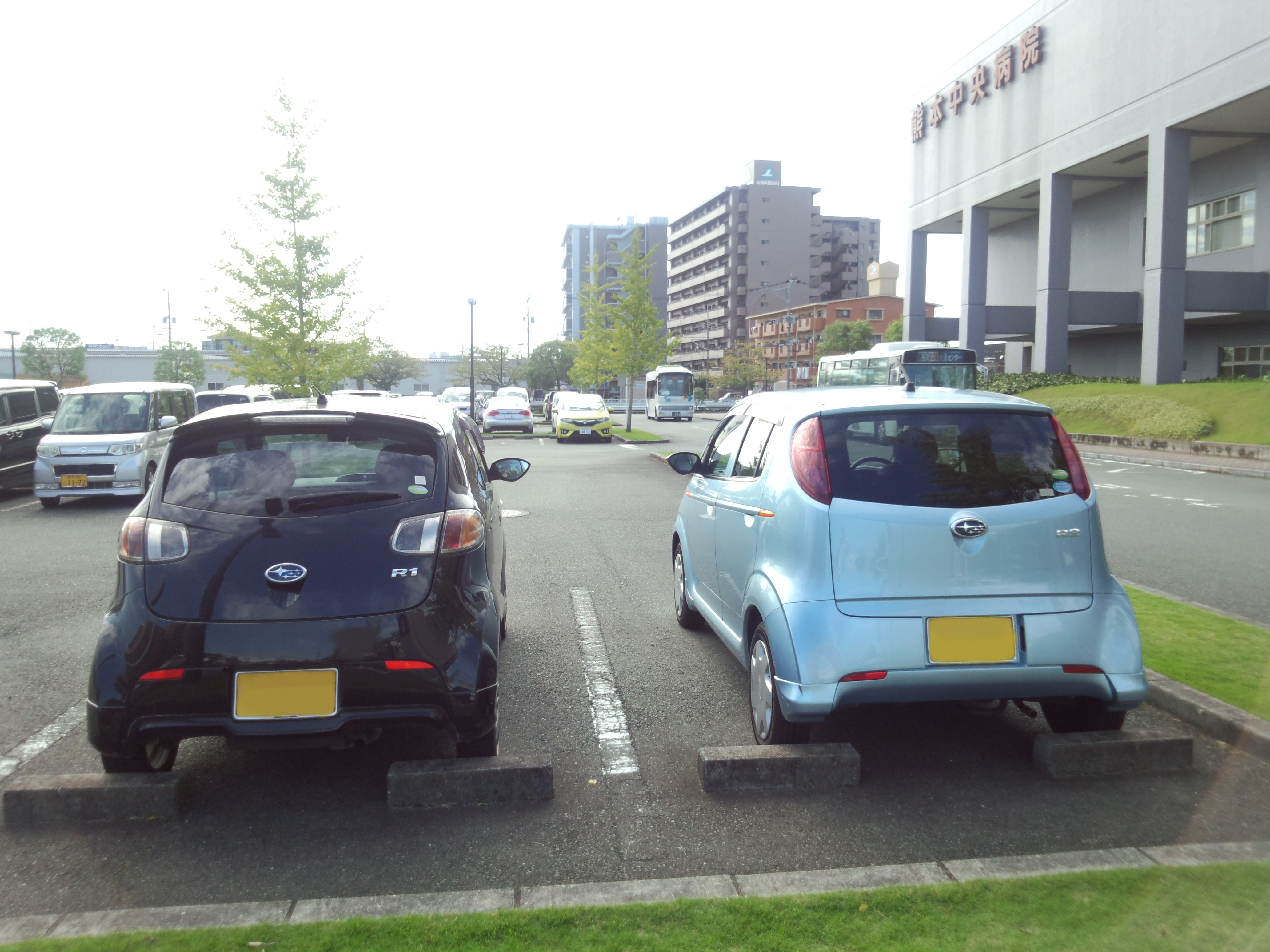 スバルR2後期型とR1Rの比較